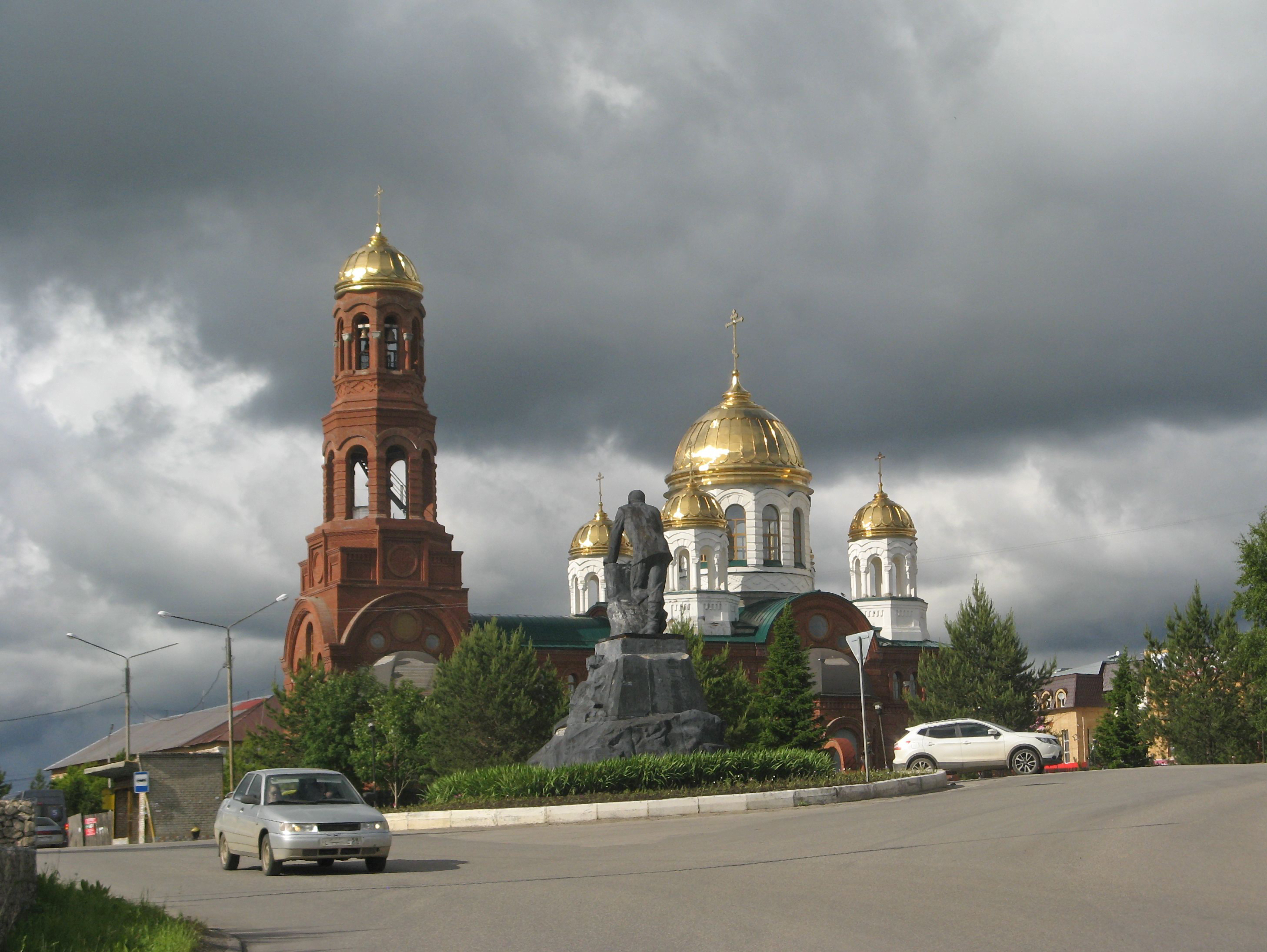 Лысьва, Свято-Троицкий храм